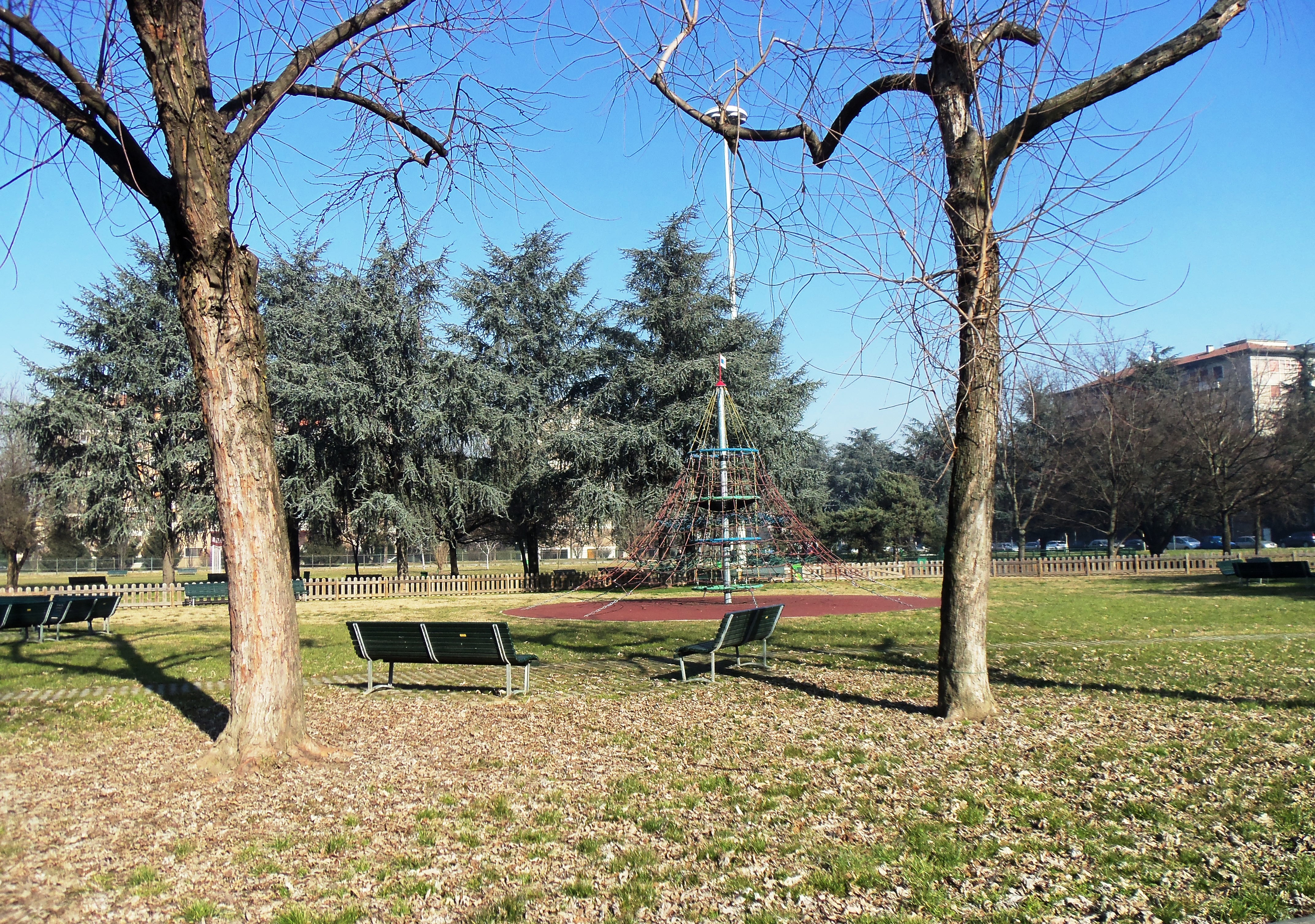 Milano, parco Guido Galli